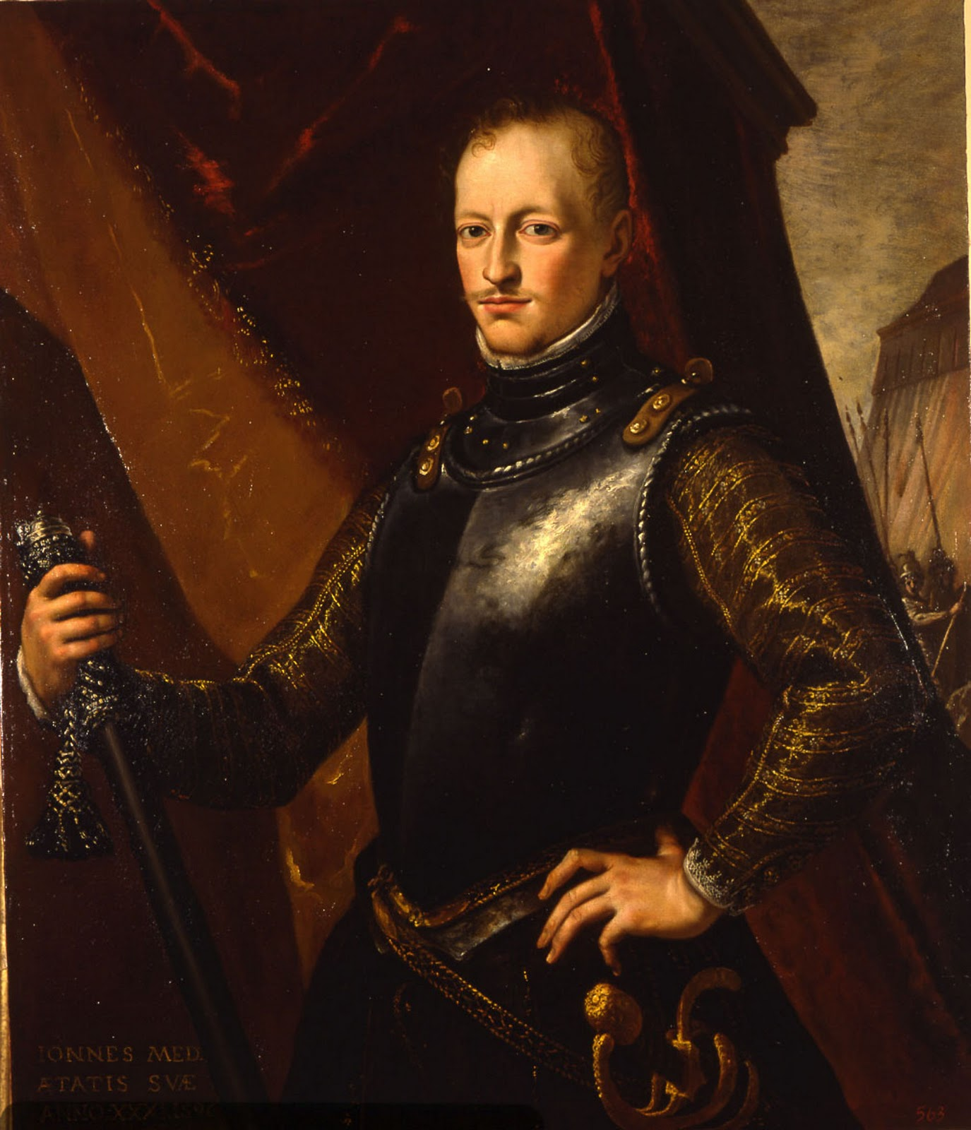 Неизвестный автор. Портрет дона Джованни де Медичи (1567 - 1621).